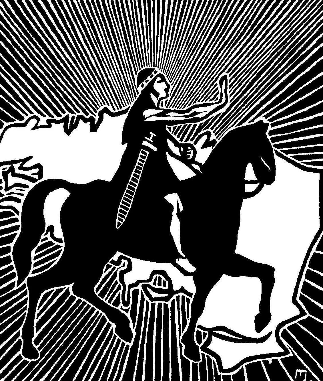 illustration from L'Histoire de Notre Bretagne, 1922